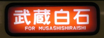 方向幕；武蔵白石